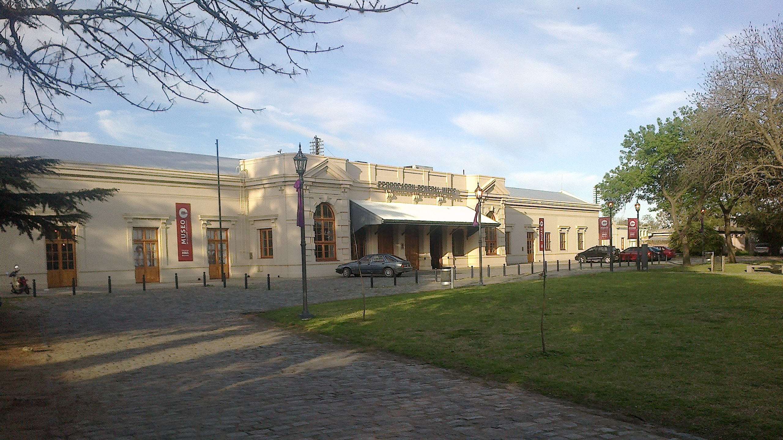 Estación de tren de Pergamino convertida en centro cultural. Provincia de Buenos Aires, Argentina.